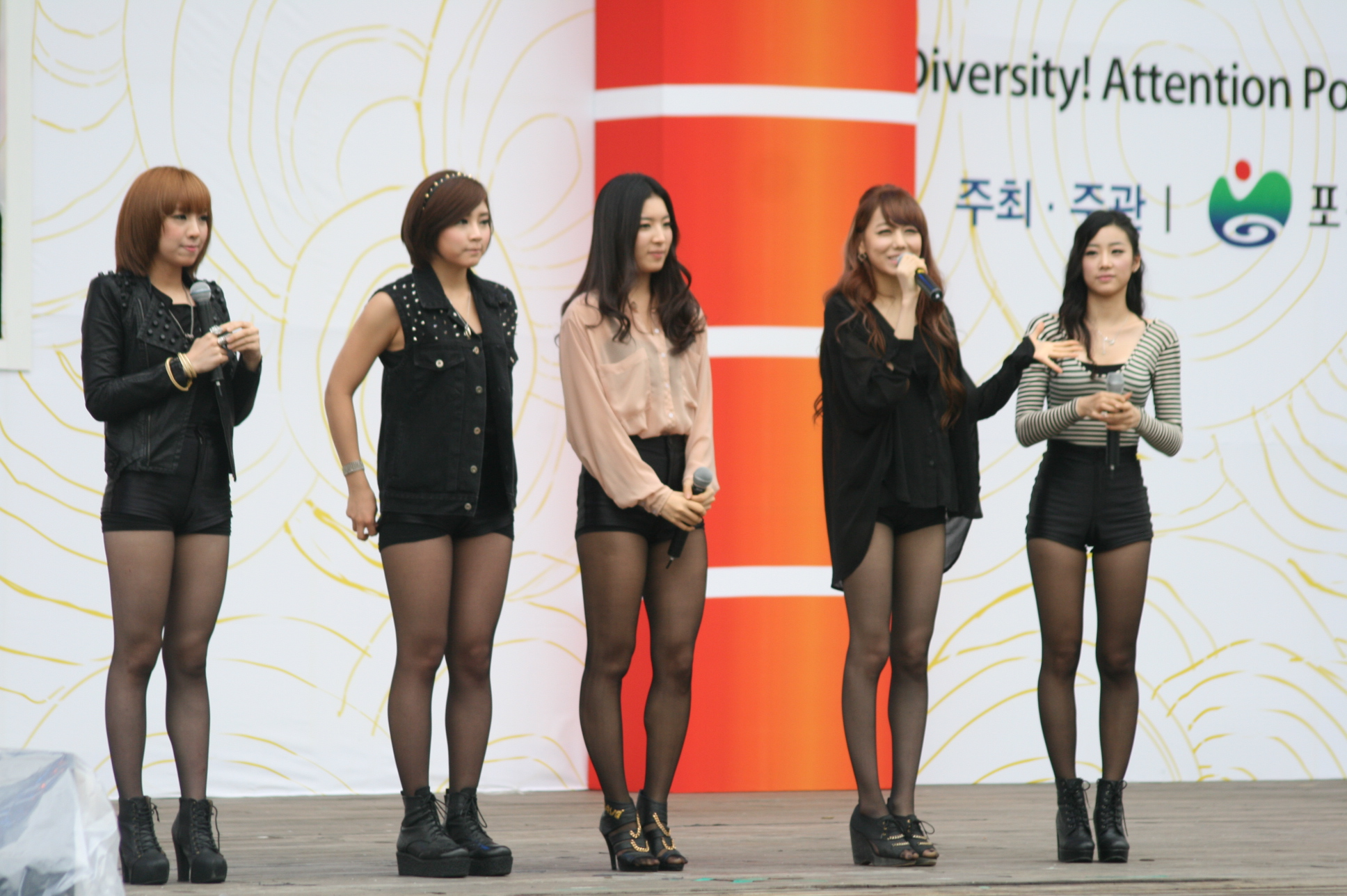 2011 무궁무진 포천 농특산물 대축전